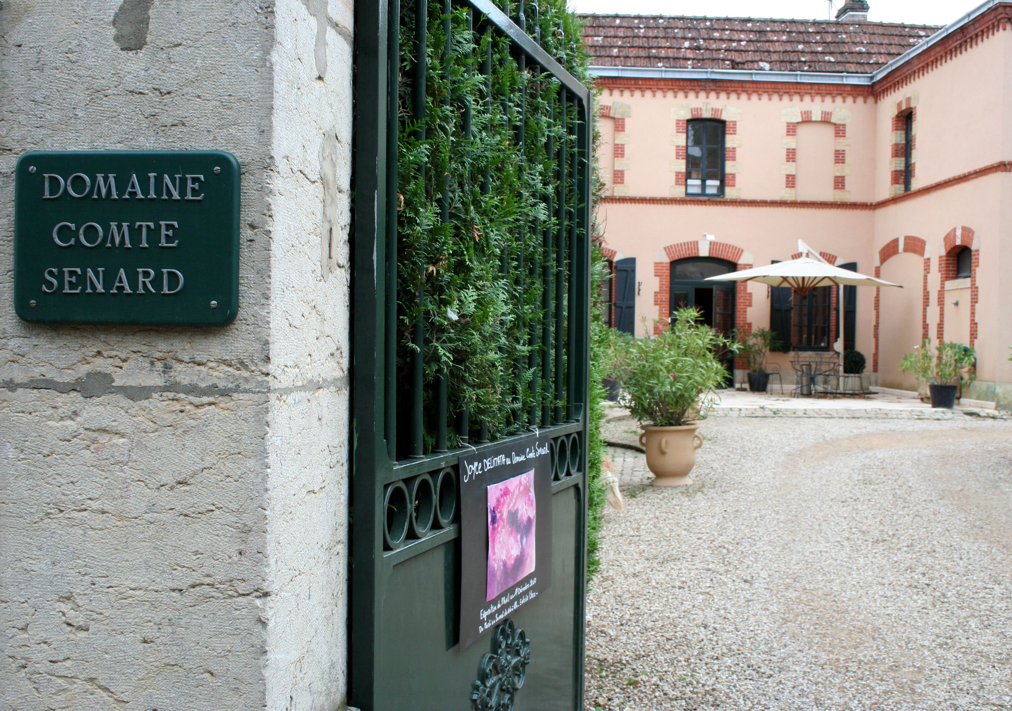 From author: "Domaine Comte Senard, Aloxe-Corton, Côte de Beaune"